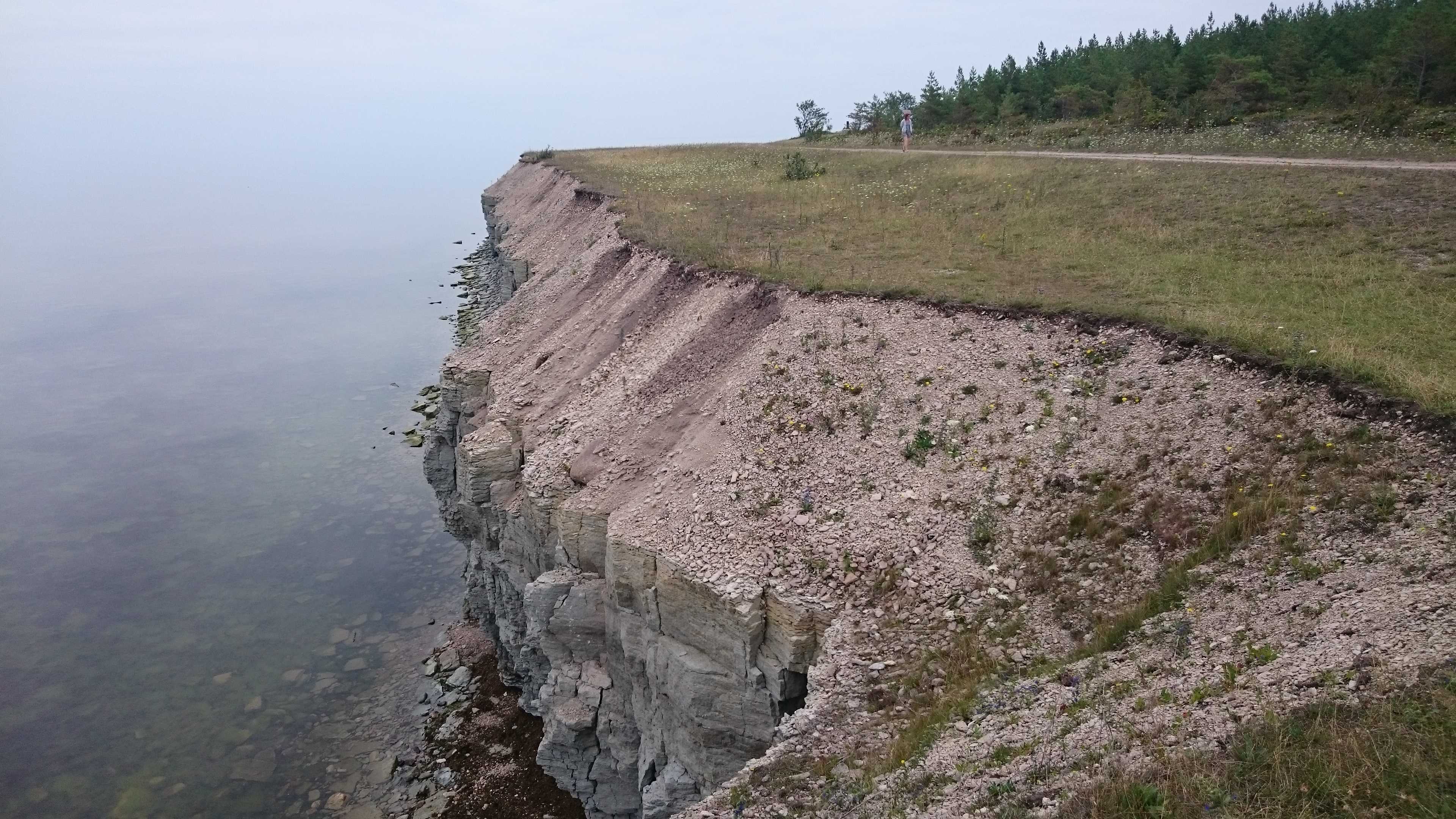 Tagaranna pank Saaremaal